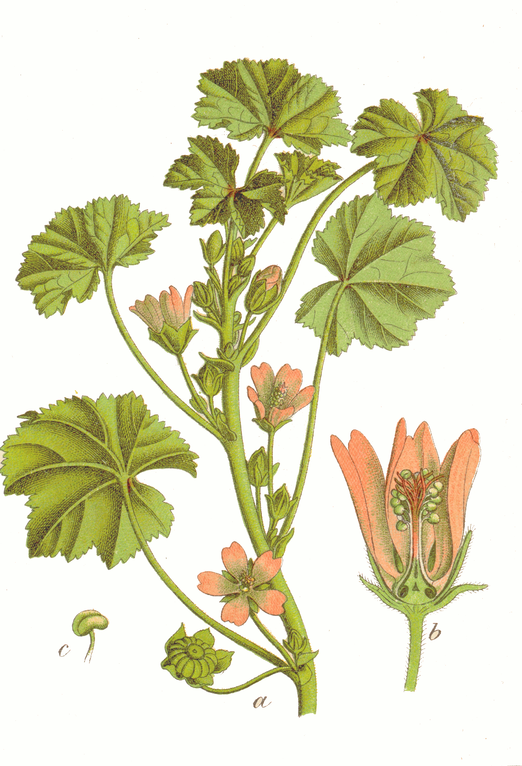 Original Caption Gemeine Malve, Malva neglecta